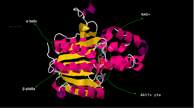 Bilden visar tertiärstrukturen för enzymet alkoholdehydrogenas samt några viktigare delar som den aktiva ytan och a-helix.